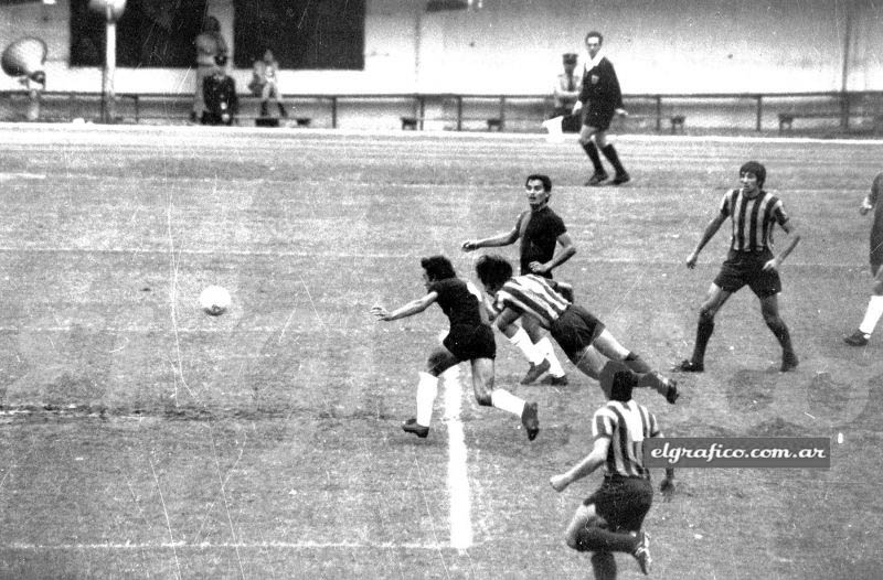 Palomita de Aldo Pedro Poy ante Newell´s en la semifinal del Nacional 1971